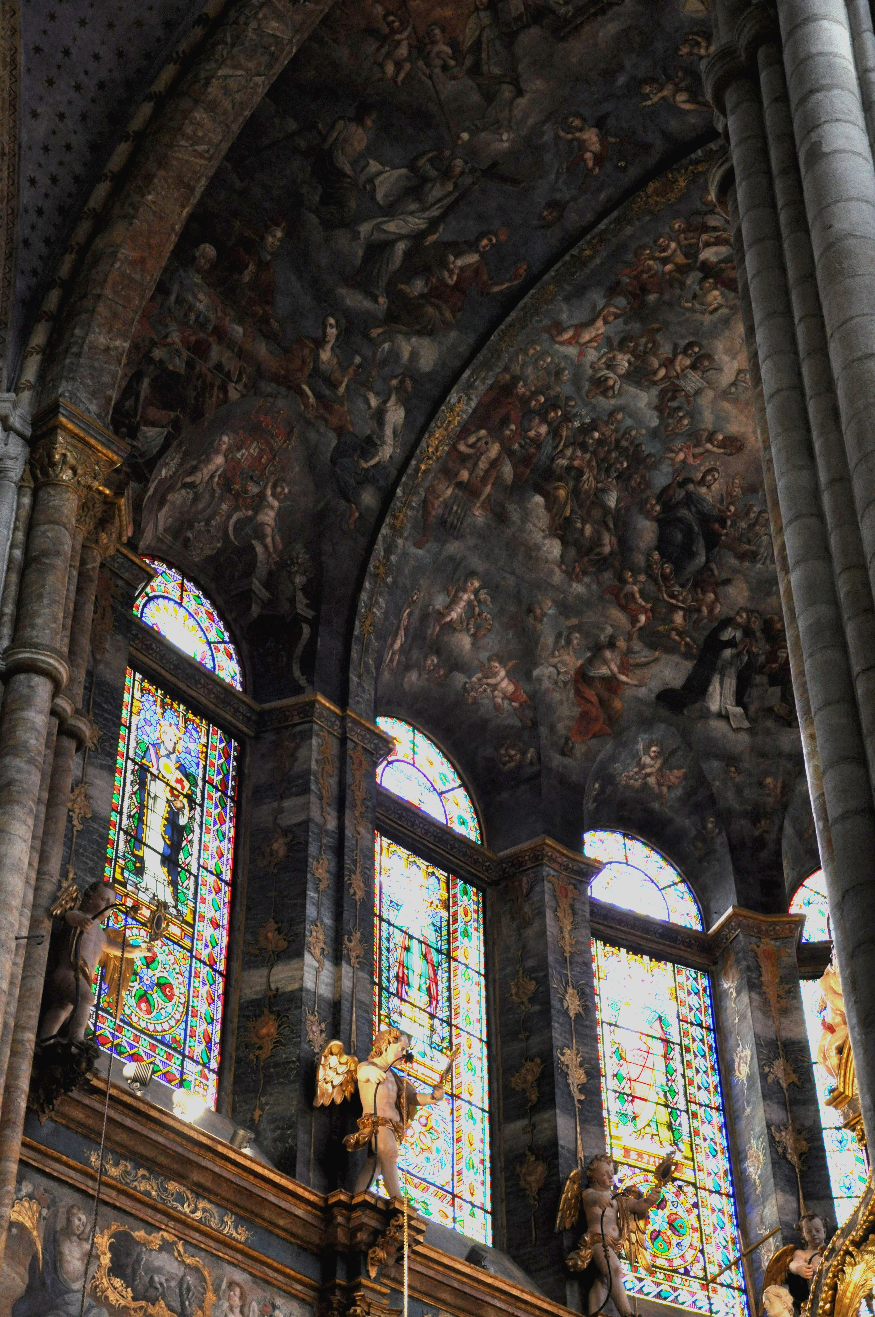 Detalle do interior da catedral de Lugo.